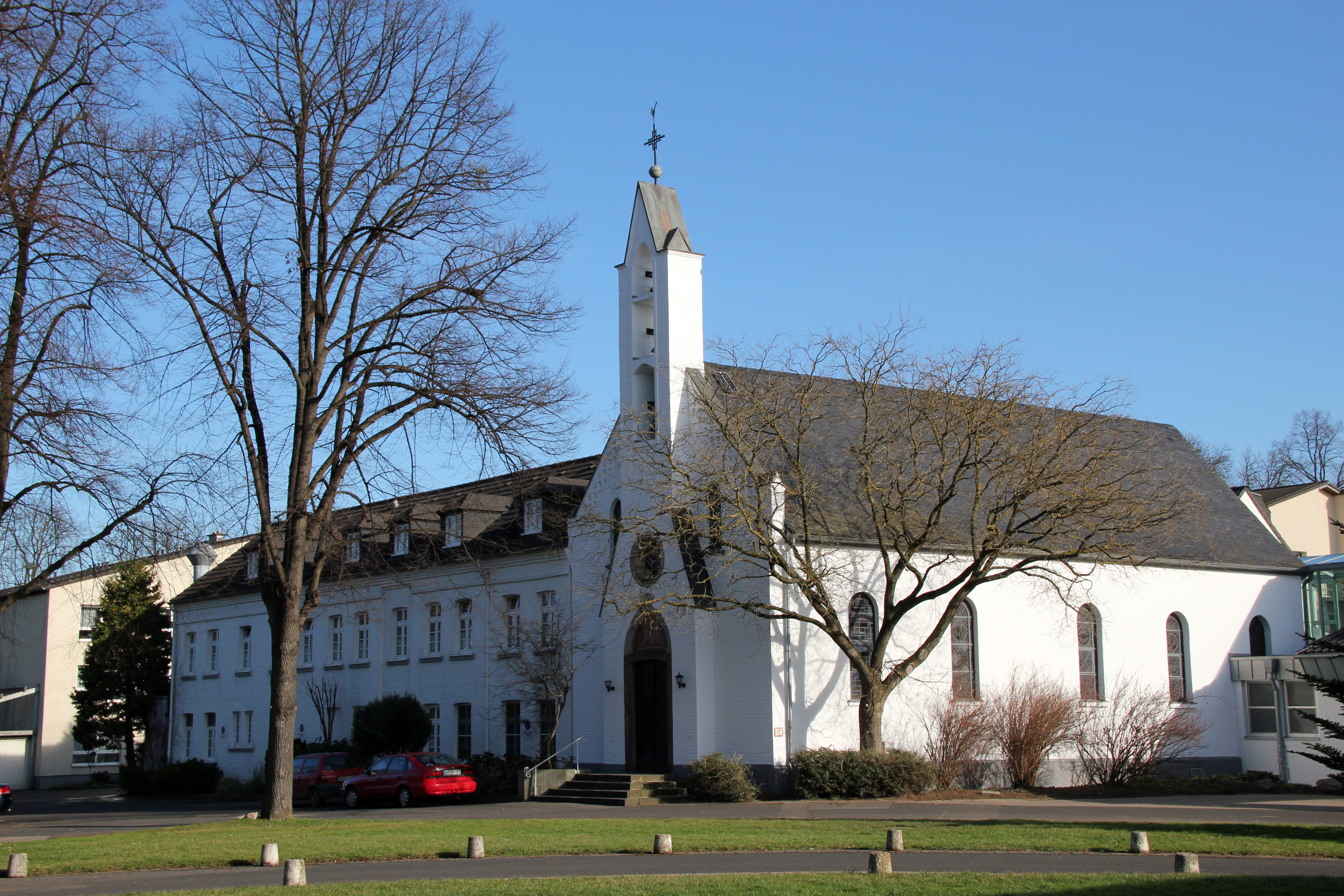 Marienkapelle Frauenthal